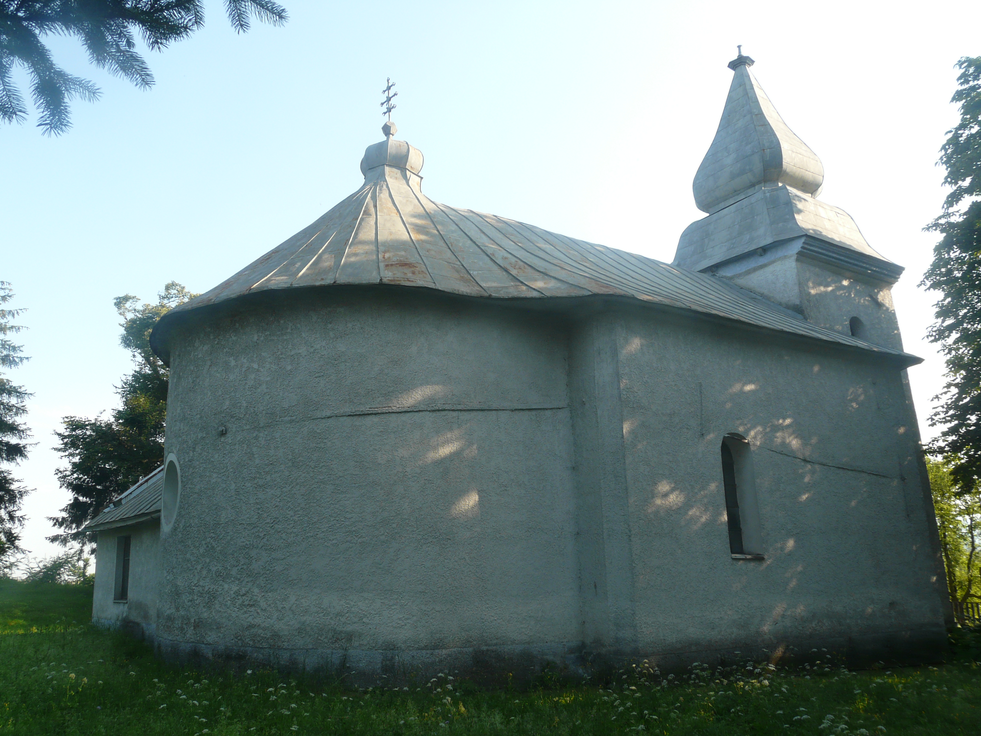 Stará pošanská cerkev.